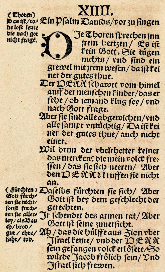 Psalm 14 (Luther 1534)